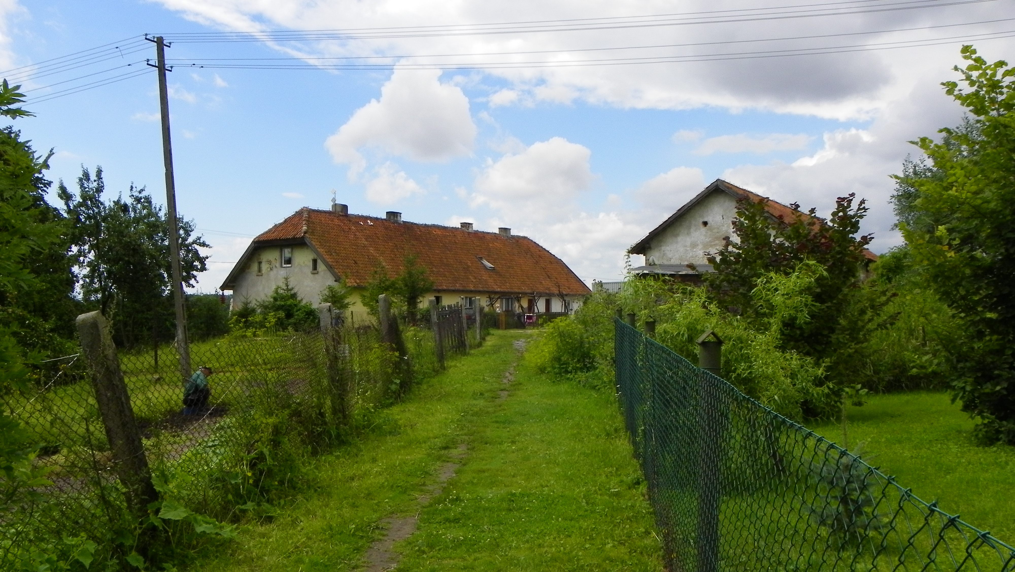 Zabytkowy dworek z pocz. XX w Czarnowcu (województwo warmińsko-mazurskie).